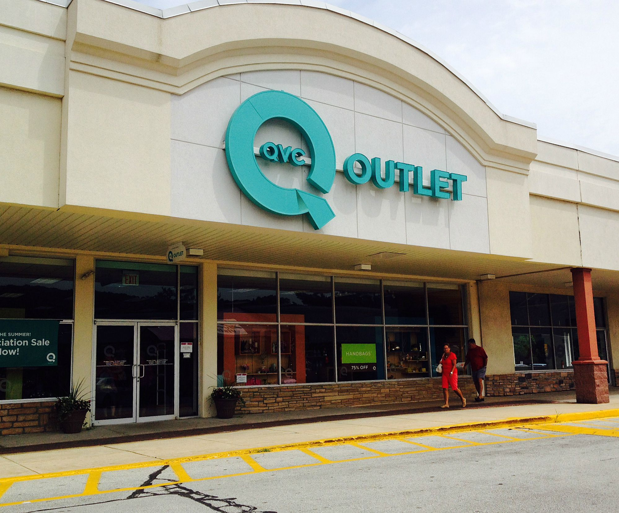 QVC Outlet Store in Frazer, PA